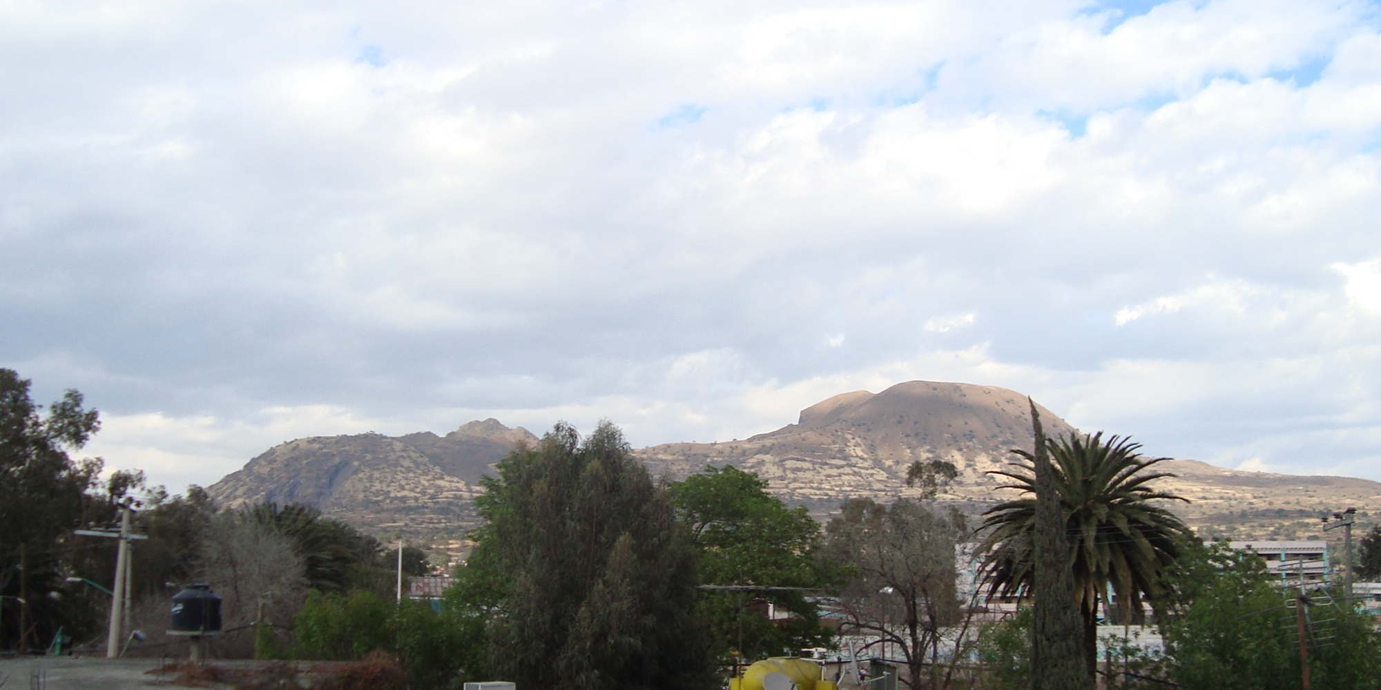 Vista de los volcanes Tecuauhtzin (izq.) y Guadalupe (izq.) de la sierra de Santa Catarina, vistos desde la colonia Selene San Francisco Tlaltenco (Tláhuac, México).